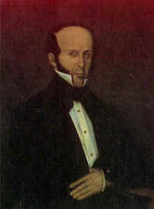 Cuadro al óleo